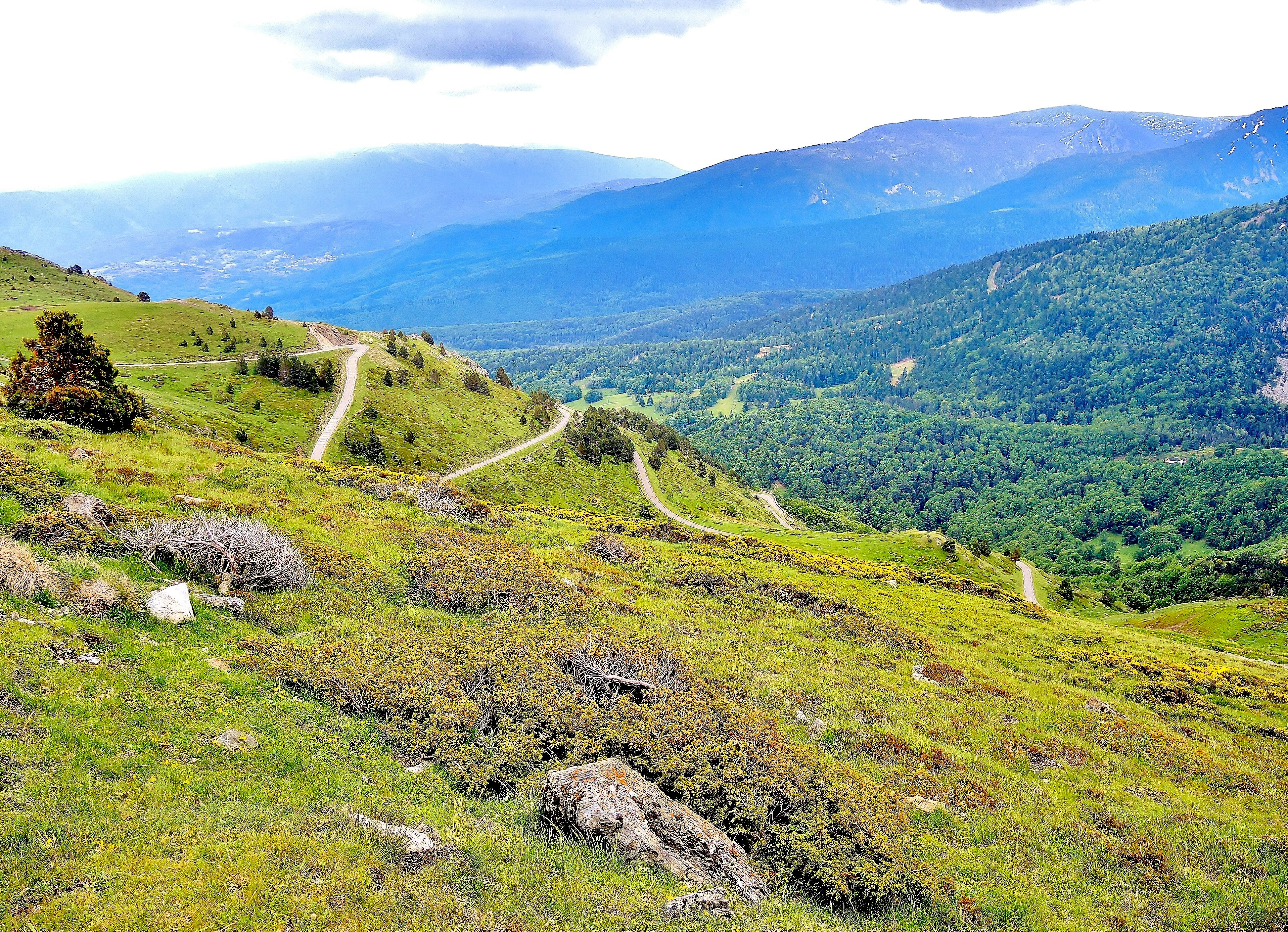 Lacets du col de Pailhères, côté est. Mijanès. Ariège